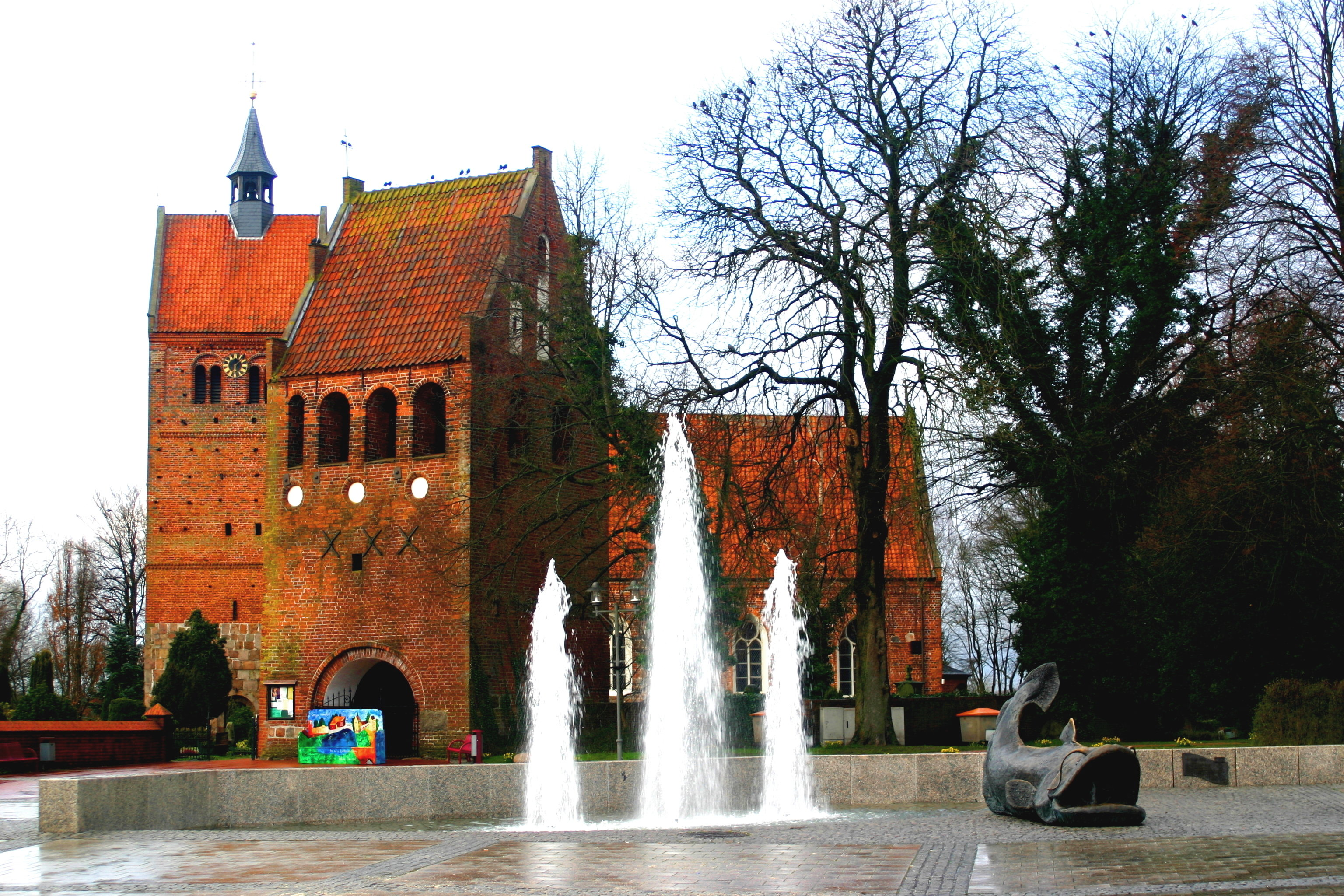 St. Johannes Kirche in Bad Zwischenahn, Lower Saxony, Germany